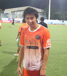 Kim Seng-Yong